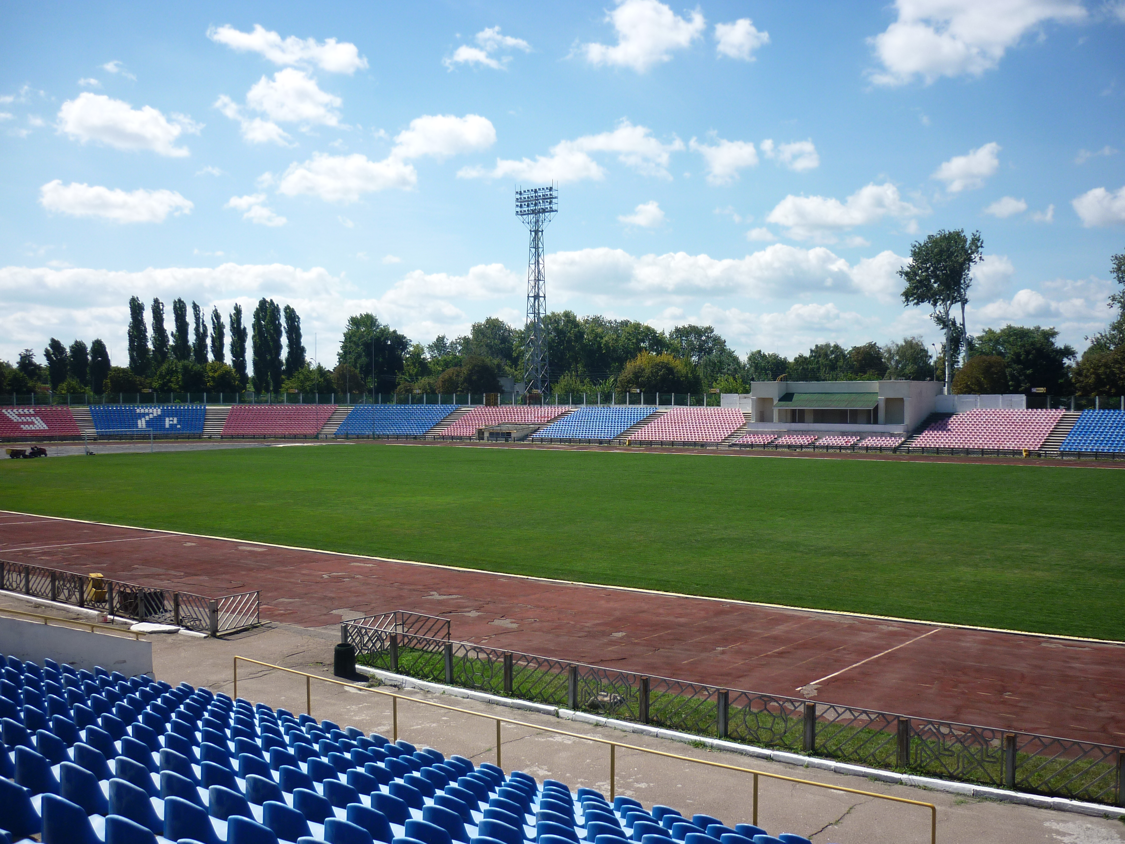 Стадіон "Центральний" в місті Черкаси. Поле